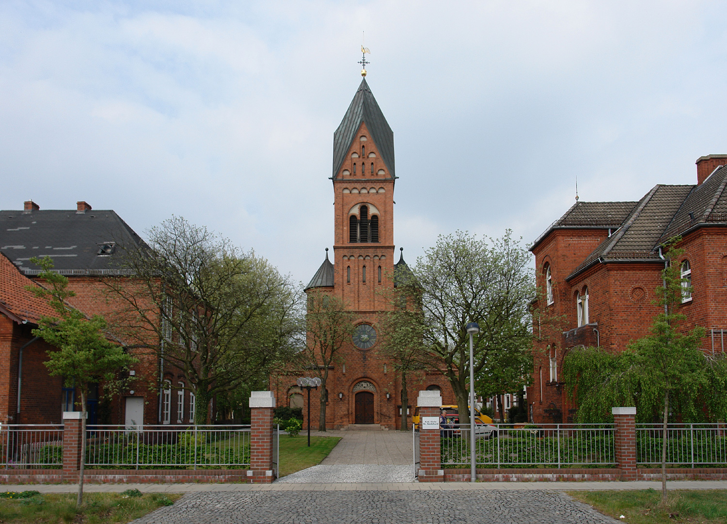 St.Godehard-Kirche in Bremen-Hemelingen. Ehemaliges Schulhaus, Kirche, Gemeindehaus.